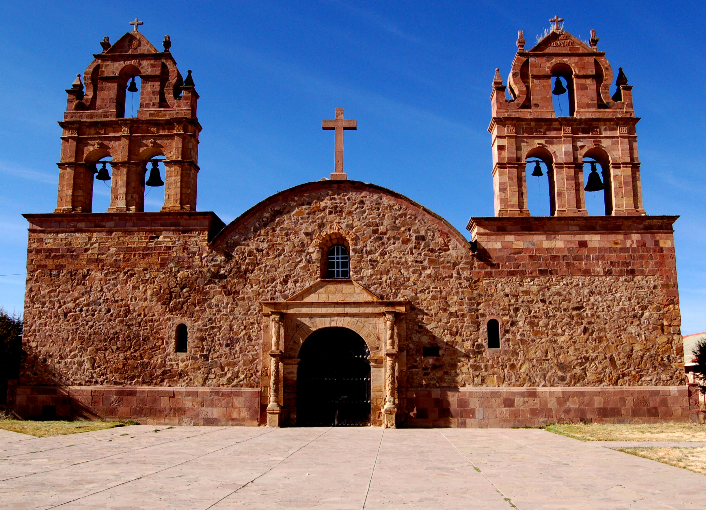 Runa Simi: Laqha llaqtap inlisyan (Tiwanakumanta rumikuna).